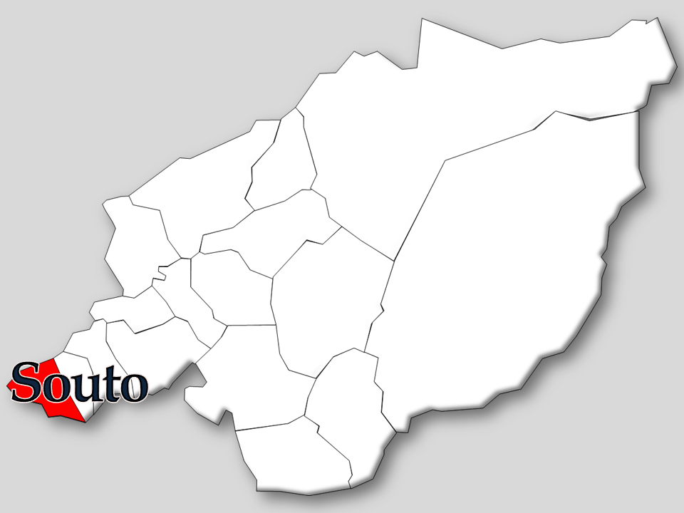 Censos 1864/2011